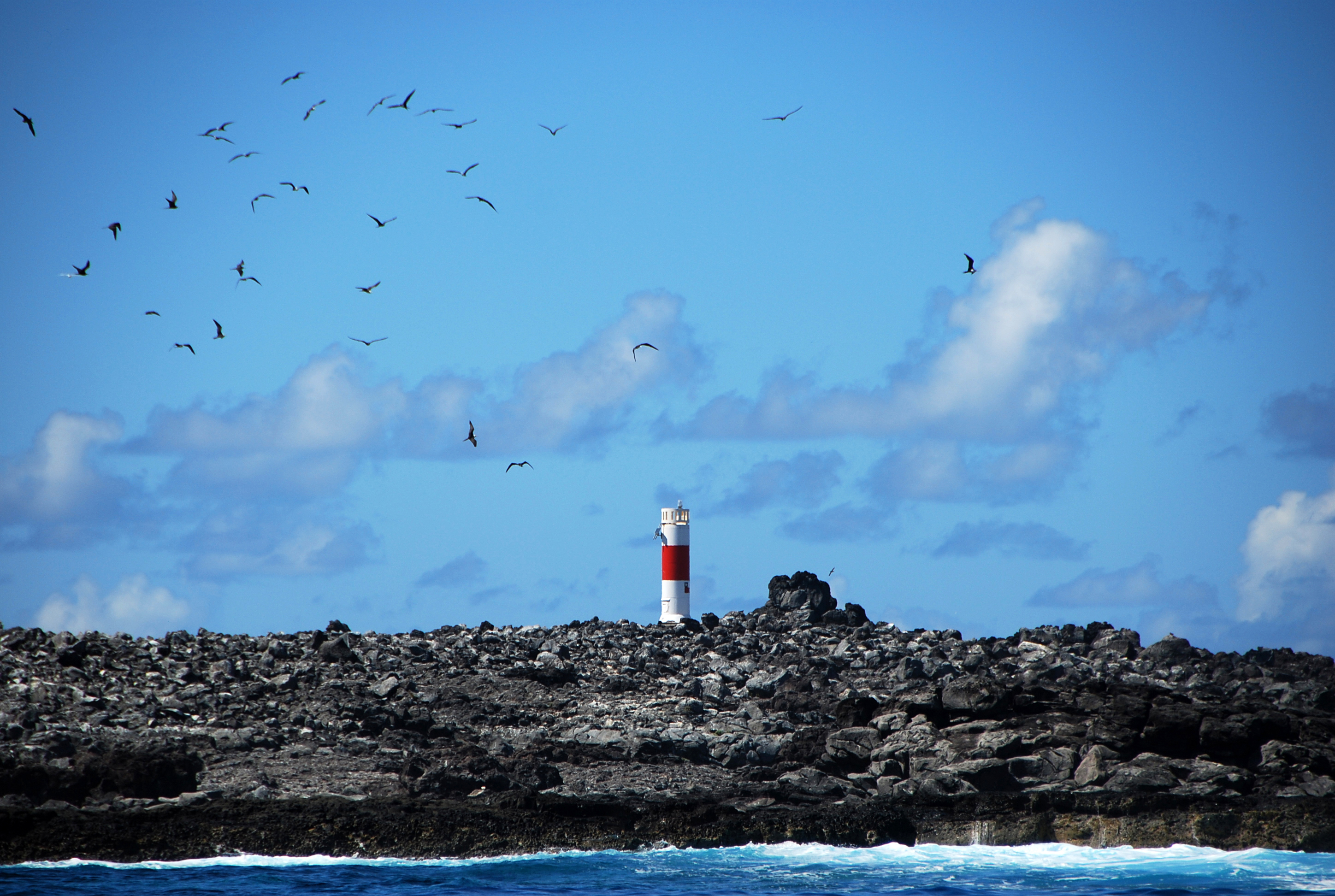 Fotos obtenidas durante la expedición que Oceana, National Geographic y la Armada de Chile realizaron en febrero al Parque Marino Motu Motiro Hiva.